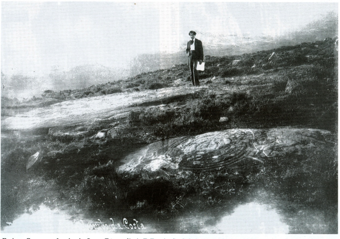 Henrique Campo Sobrino no Lombo da Costa en 1908 por Francisco Zagala Pérez